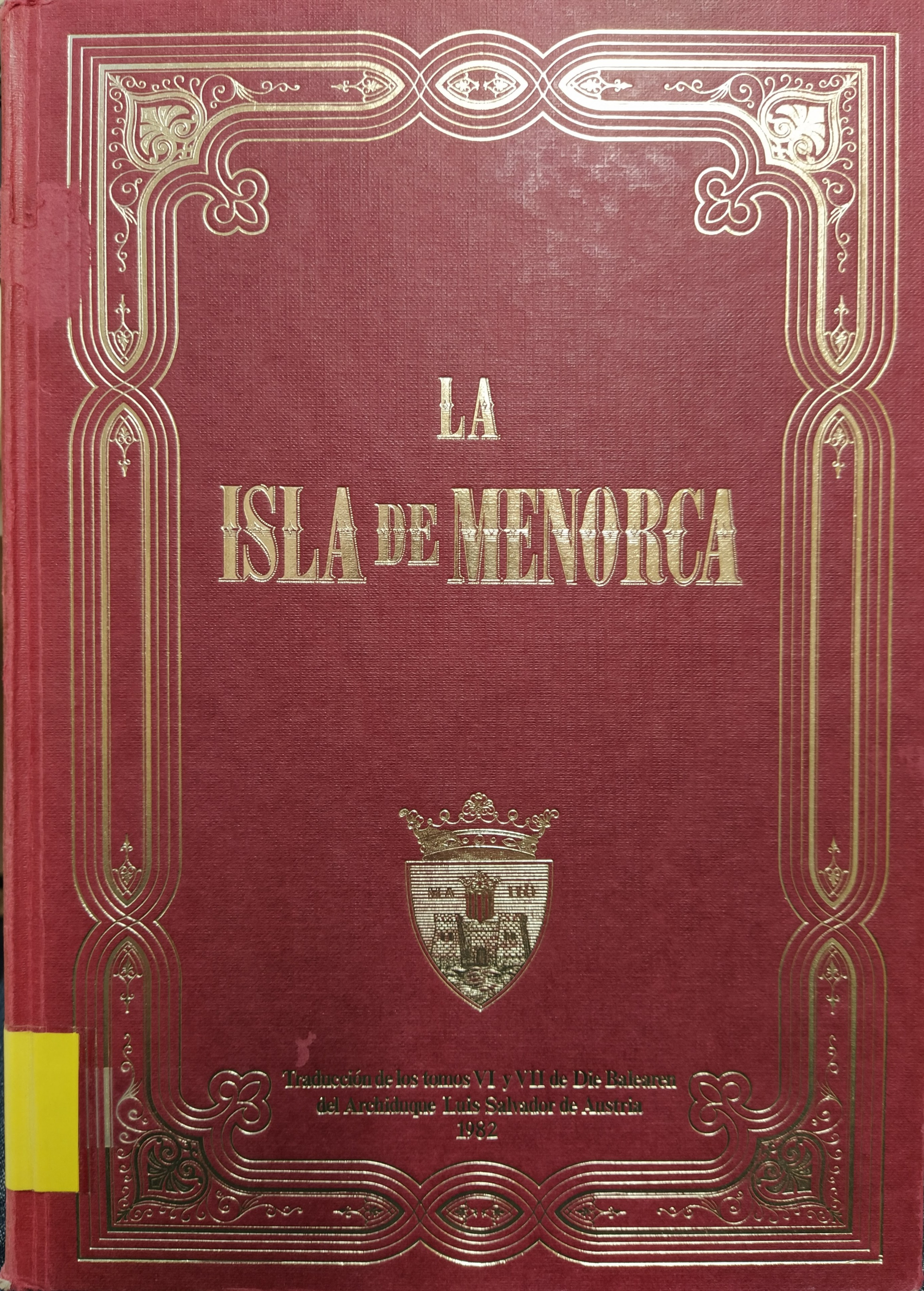 Portada de l'edició de 1992 del primer llibre sobre Menorca de Die Balearen in Wort und Bild Geschildert que es troba a la biblioteca municipal de ca'n Sales a Palma de Mallorca